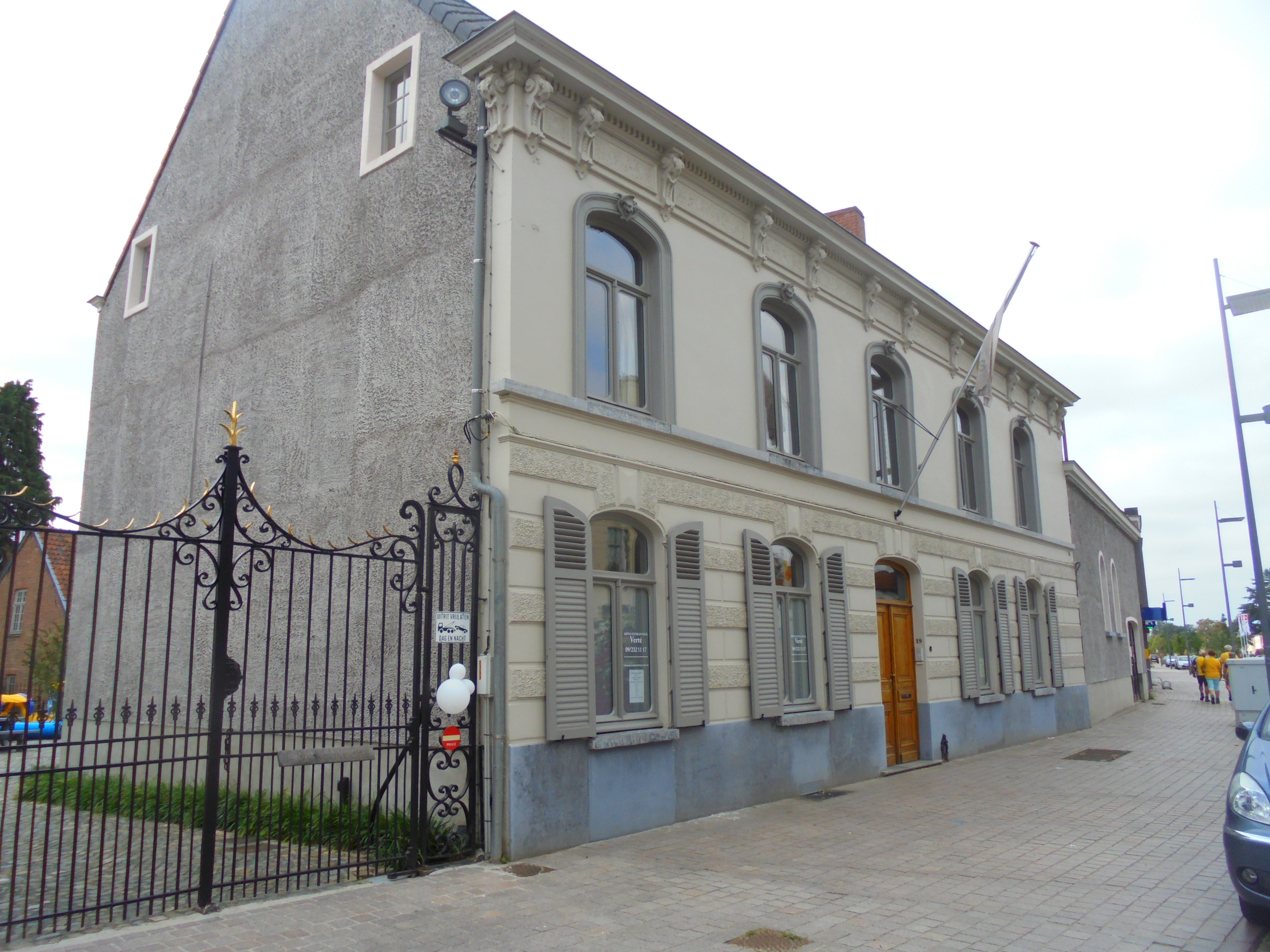 Woning Brouwerij Hoprank - Dorpsstraat - Laarne - Oost-Vlaanderen - België